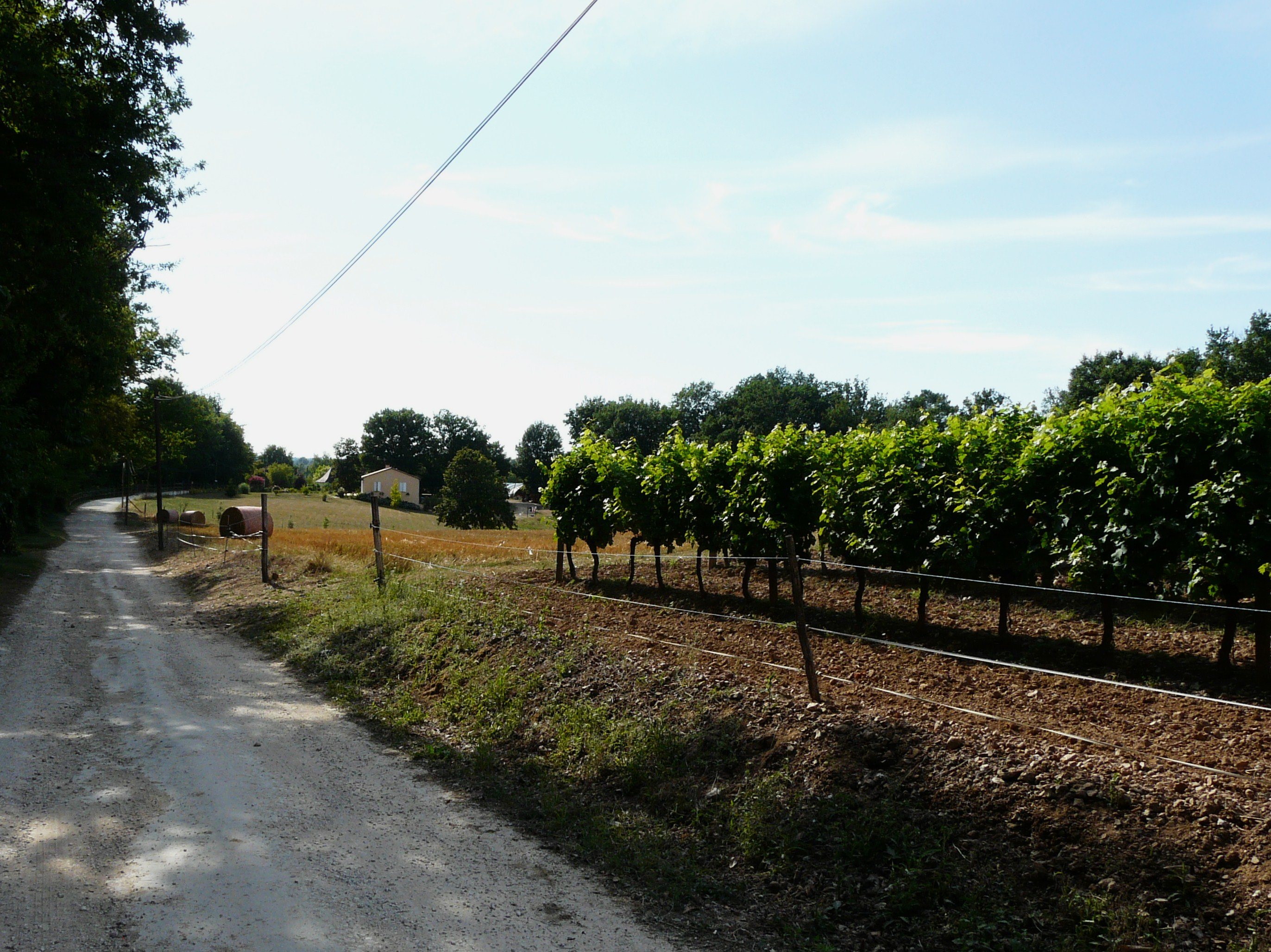 Le sentier de grande randonnée GR 36 à l'est d'Escoffie, Plazac, Dordogne, France.